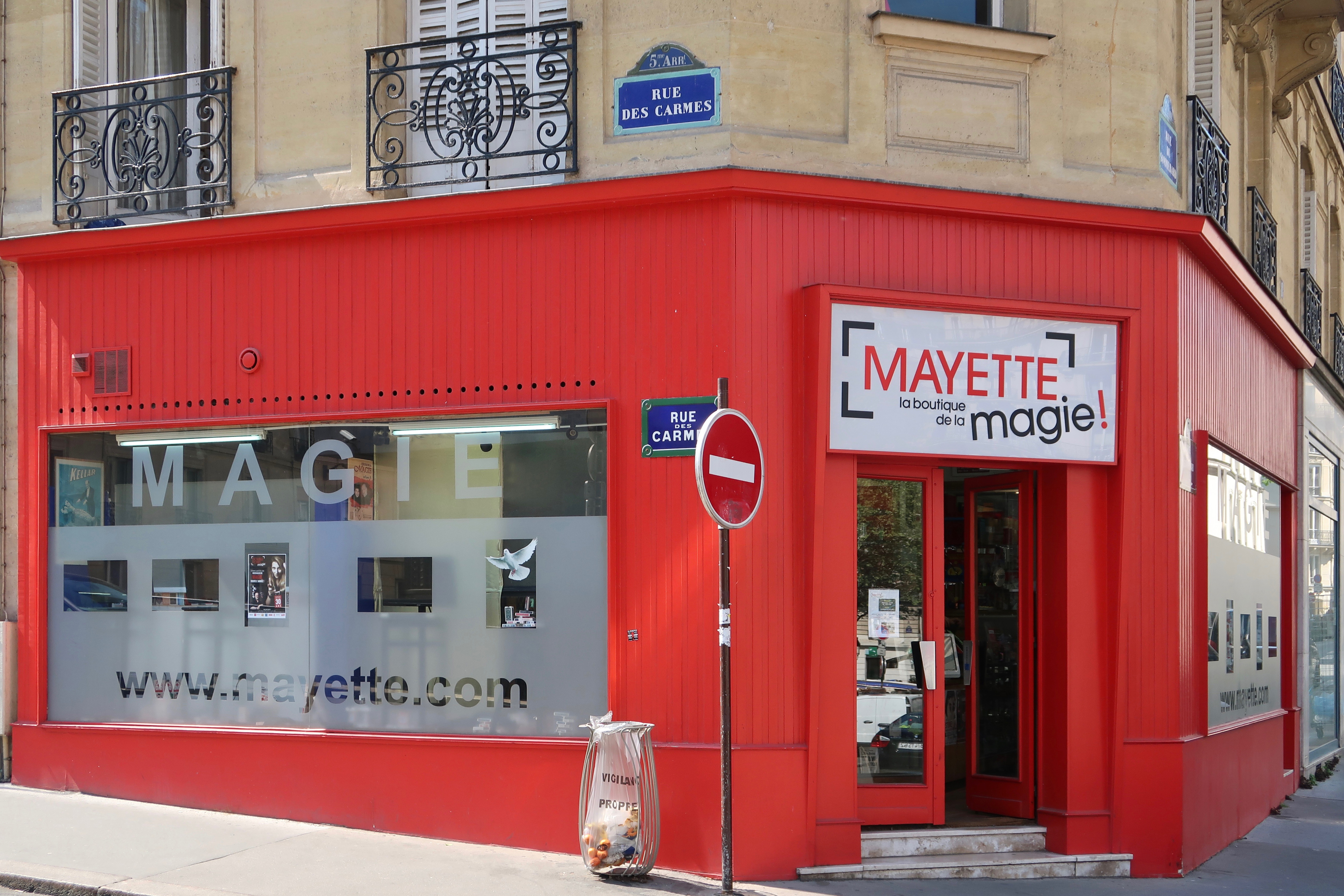 Mayette Magie, 8 rue des Carmes (Paris, 5e).